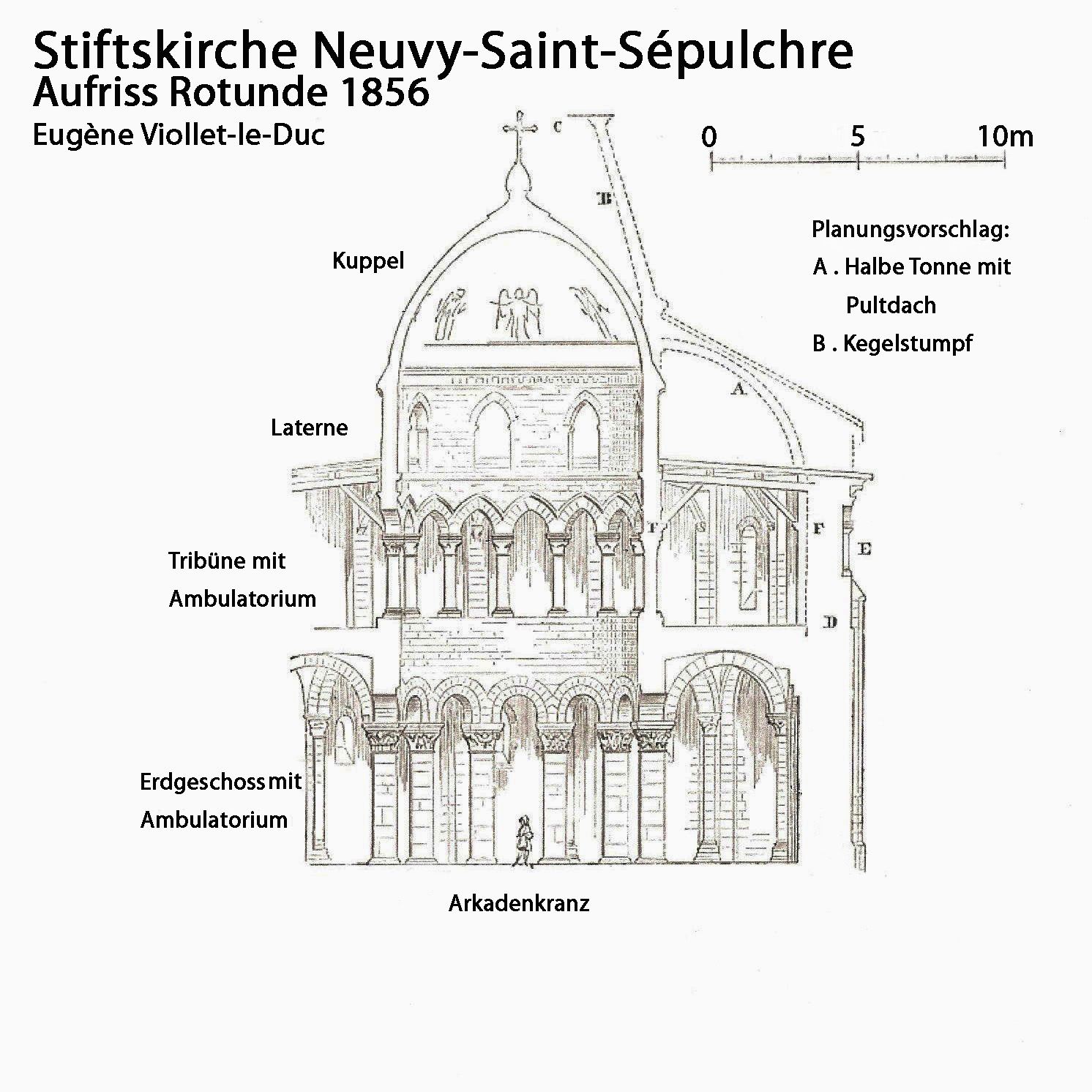 Neuvy-St.-Sépulchre, Rotunde Aufriss